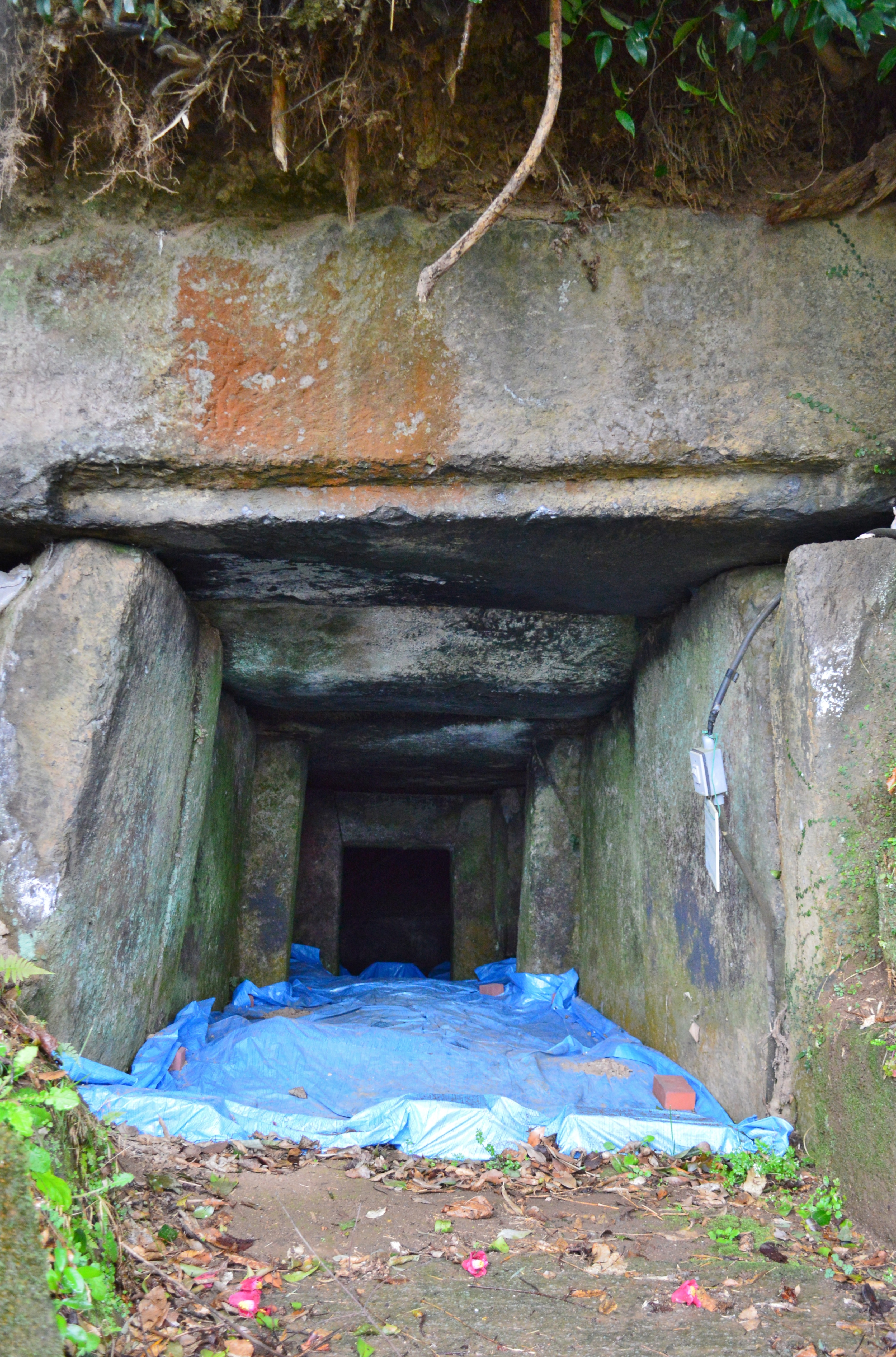 大野窟古墳 石室入り口